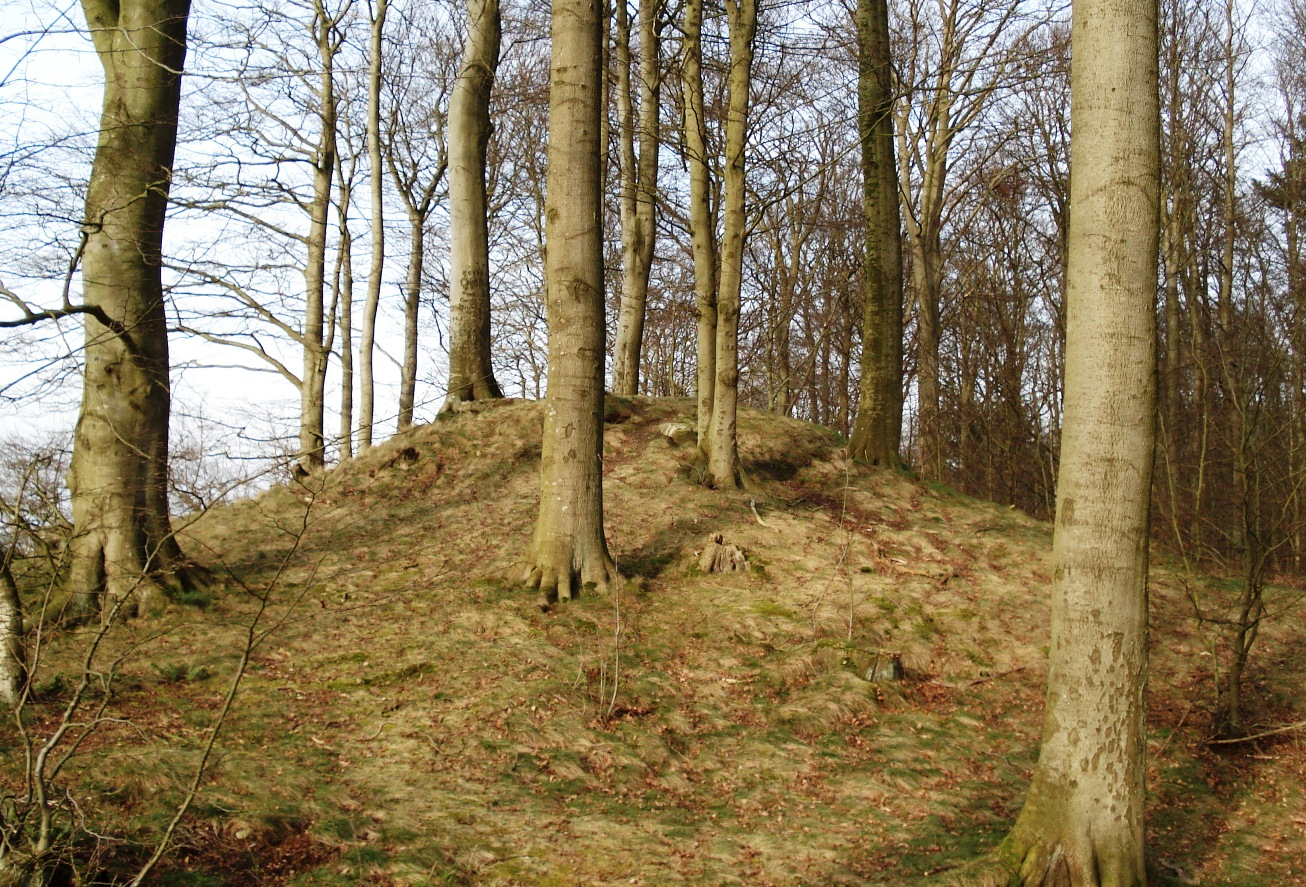 Südlicher Grabhügel bei Stubbenberg - Süd